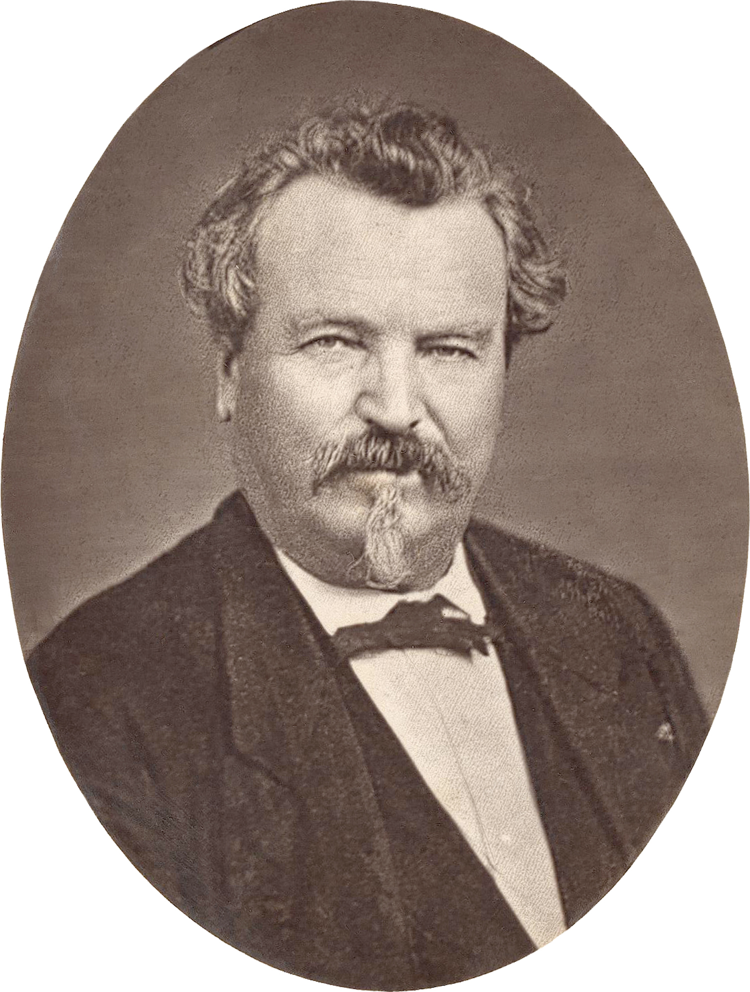 Calotype de 1866